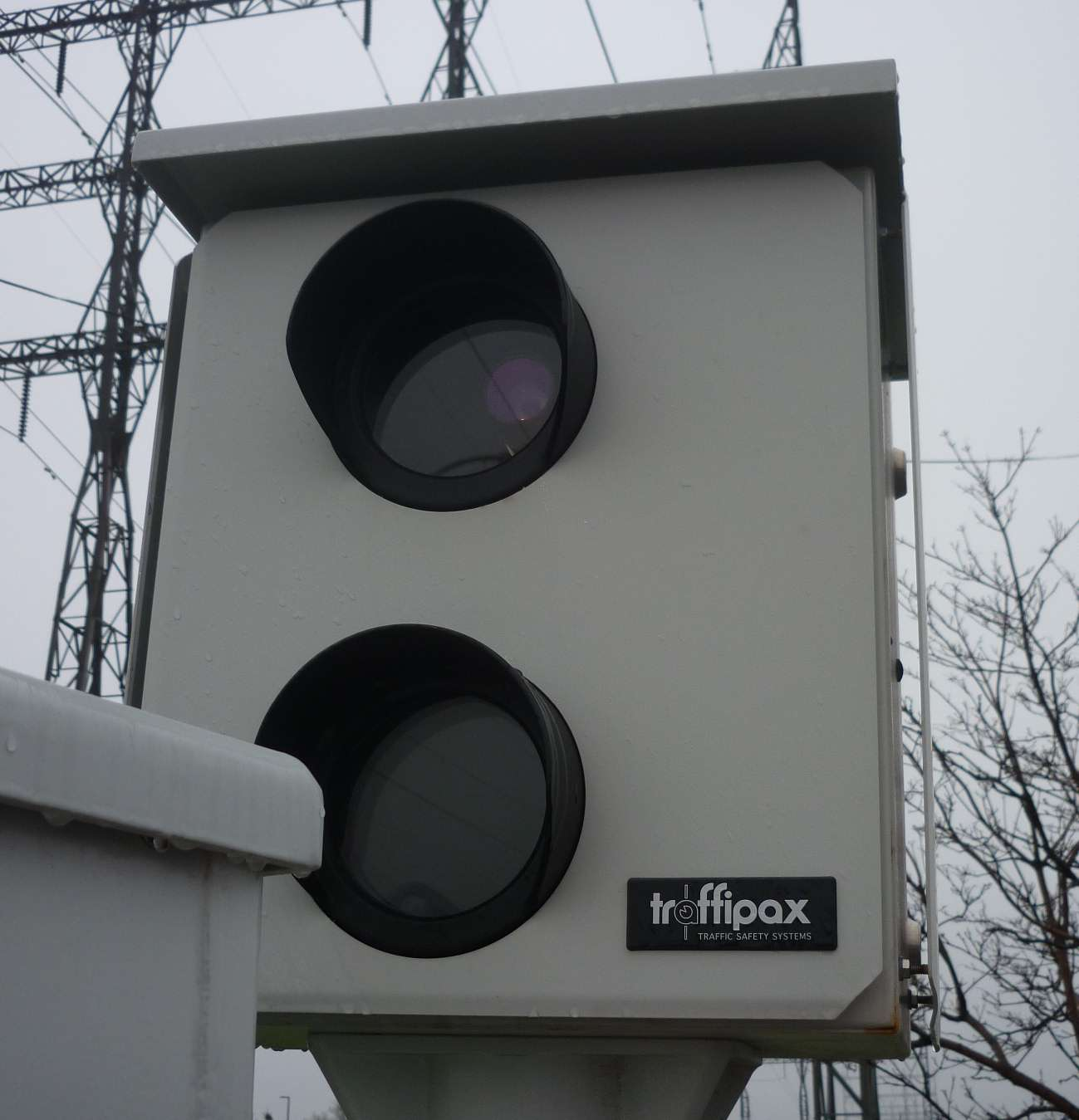 Камера автофіксації проїзду на червоне світло